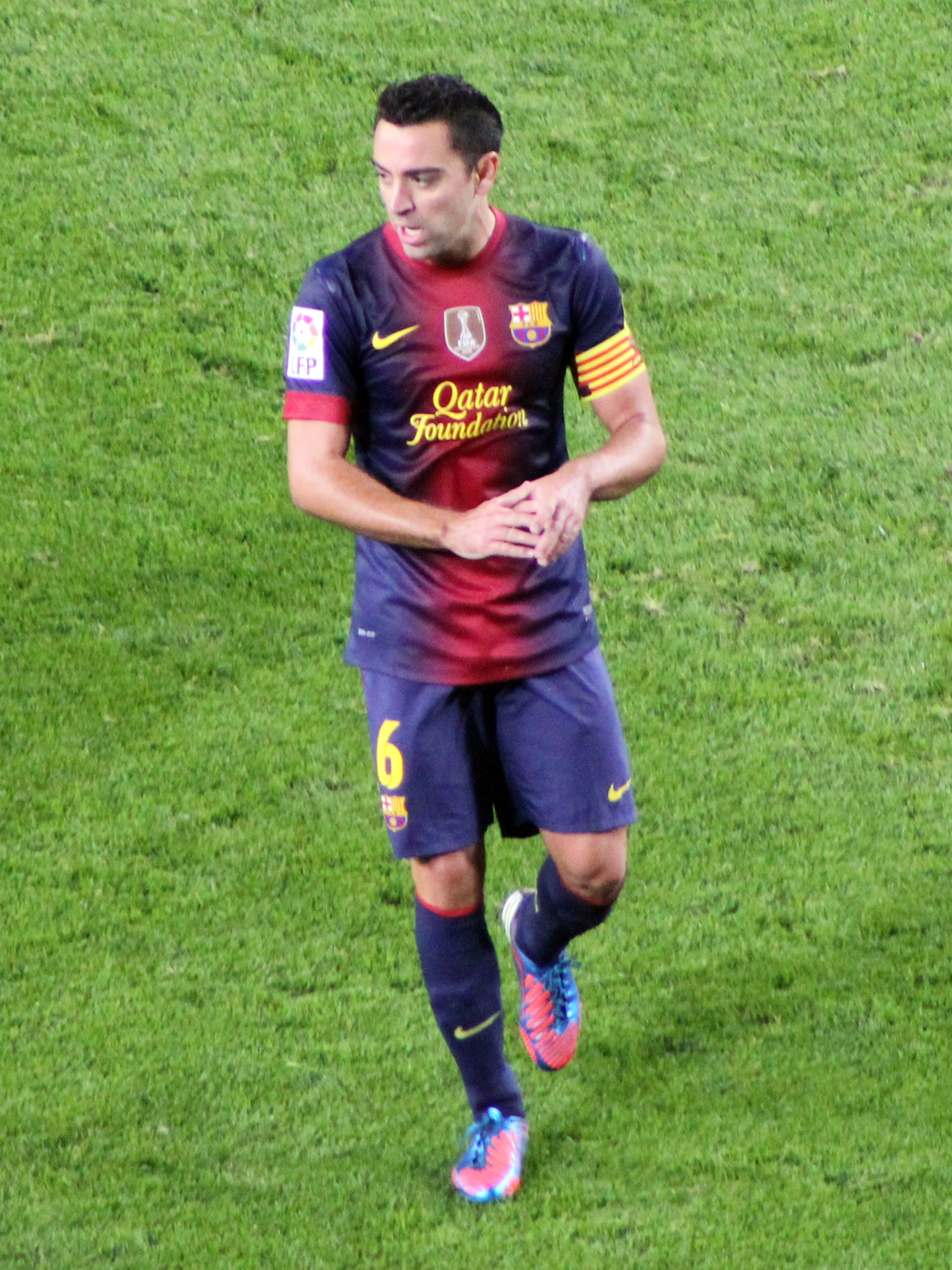 Foto realizada por Javier Segura (@castroquini en Twitter)